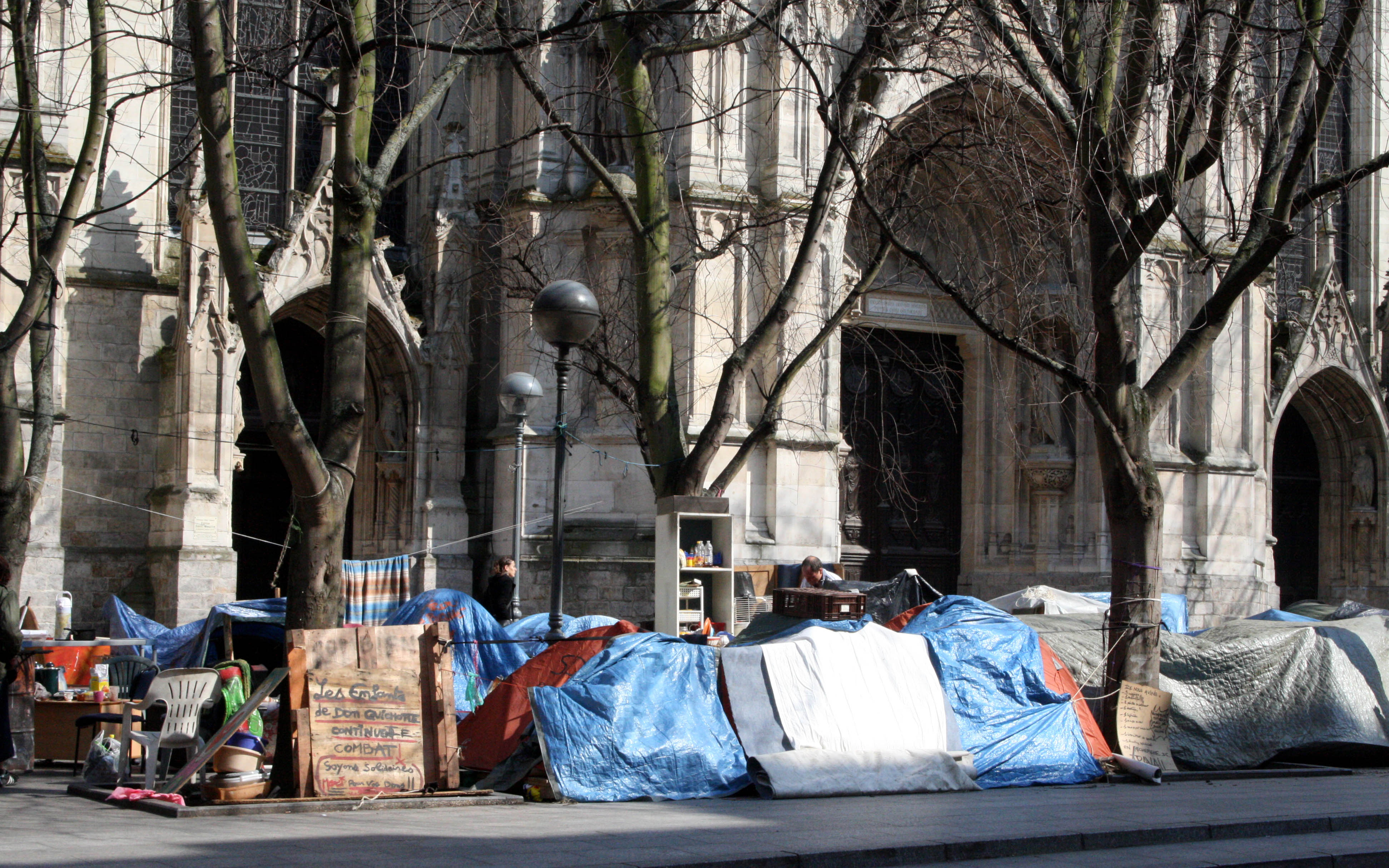 Enfants de Don Quichotte à Lille devant l'église Saint-Maurice